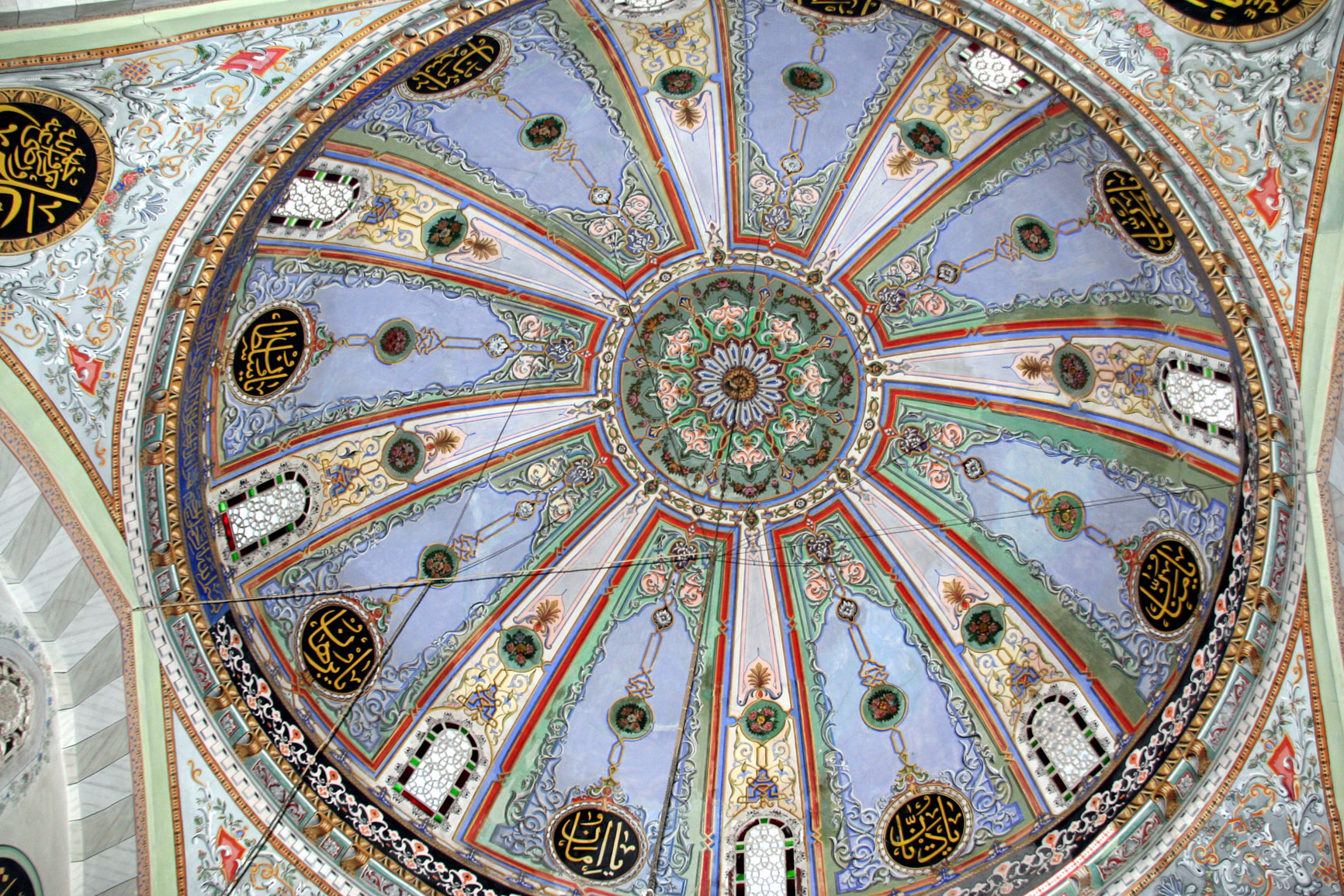 Büyükcamii-çankırı